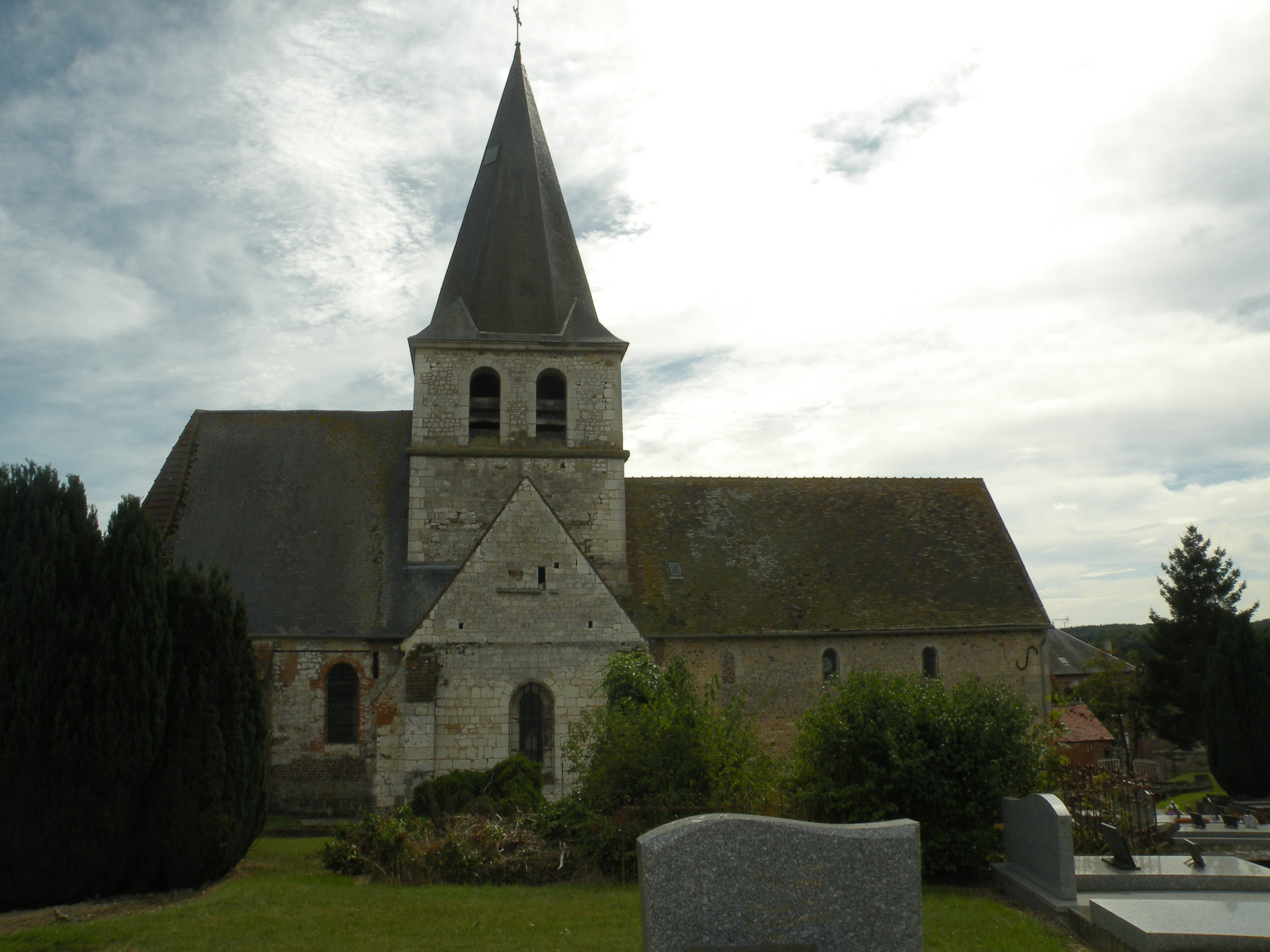 Bonnières (Oise)